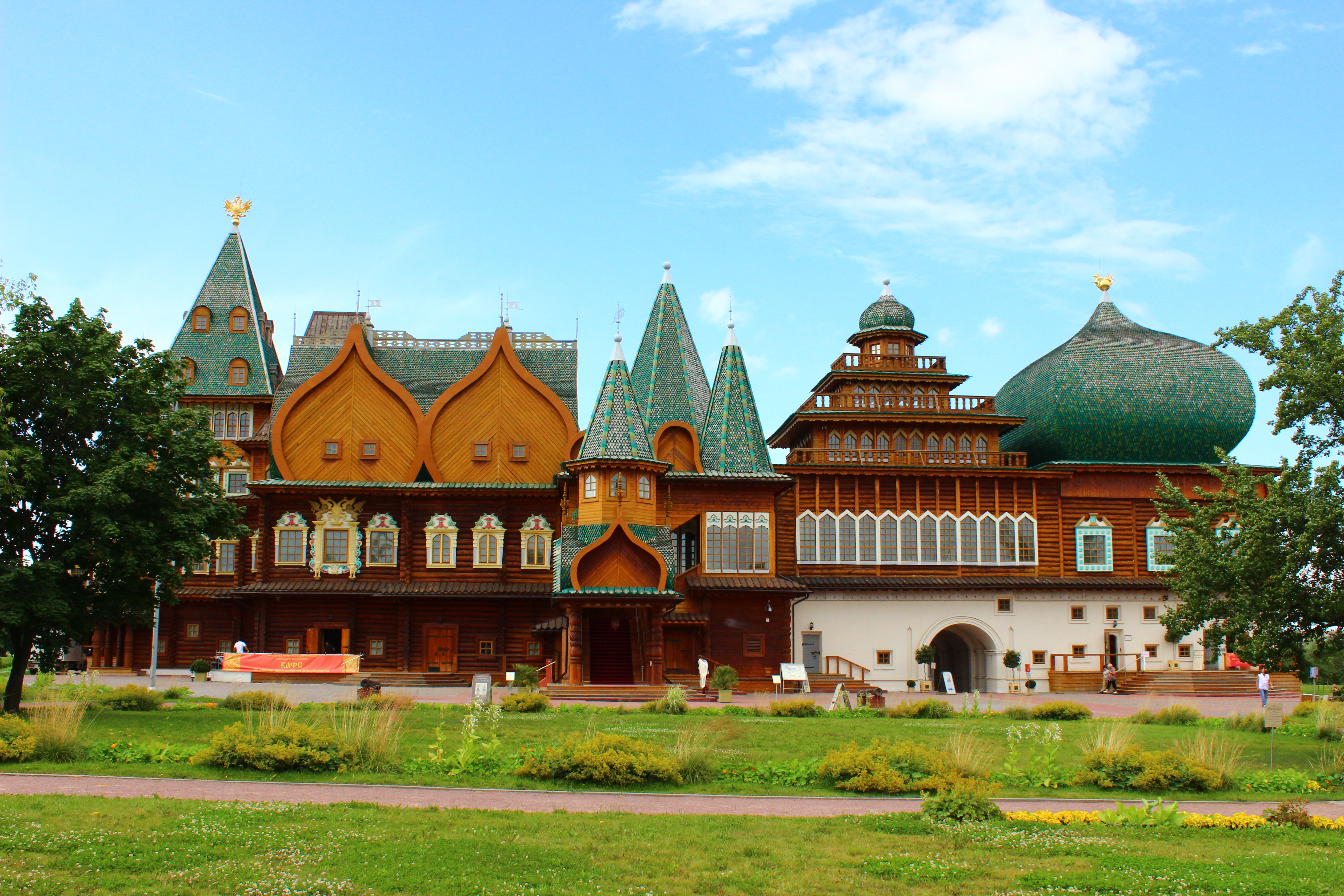 Усадьба «Коломенское» (Москва и Московская область, Москва, Андропова проспект, 31, 39)